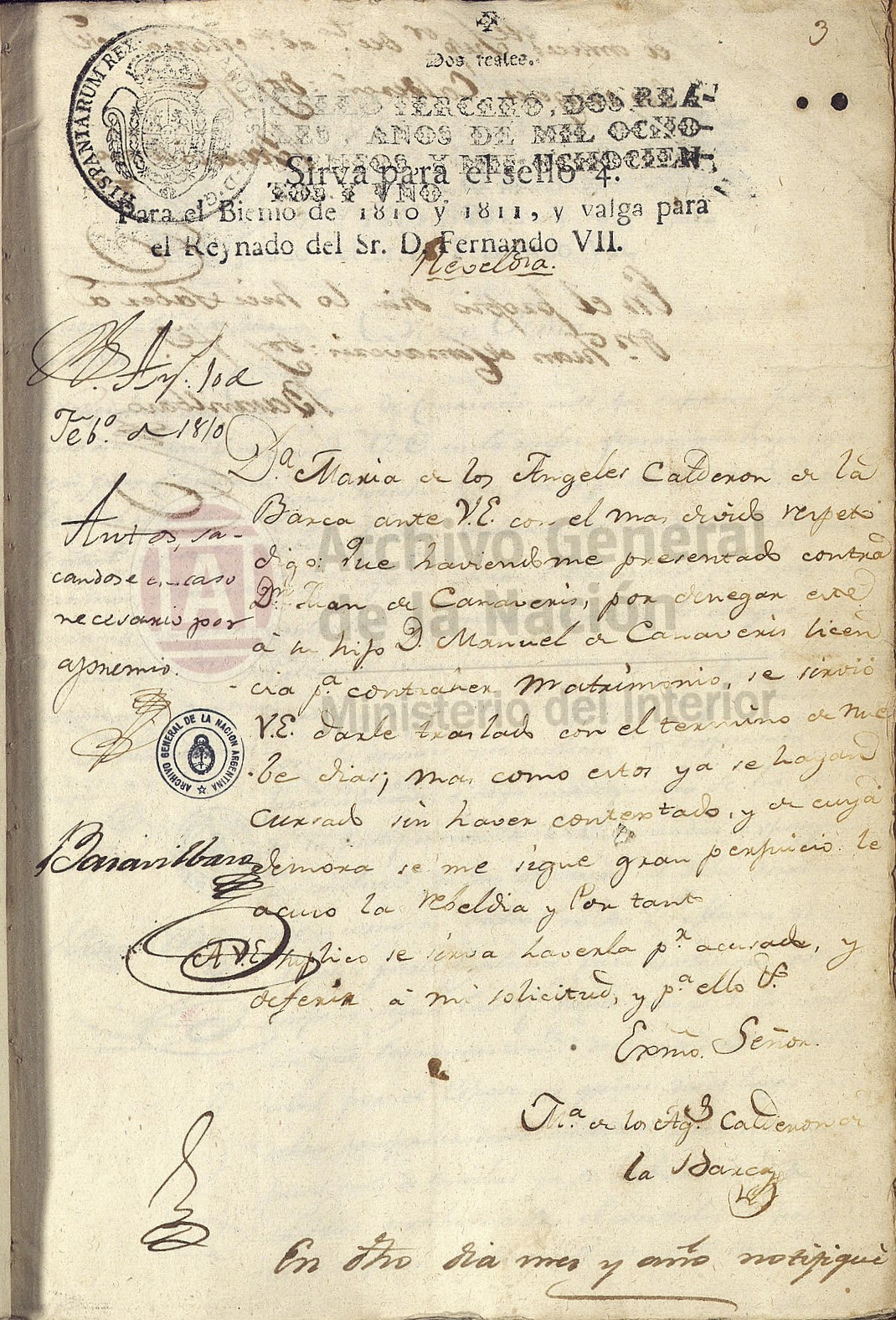 Escrito presentado por doña María de los Ángeles Calderón de la Barca en el juicio contra Juan Canaveris, padre de su prometido.